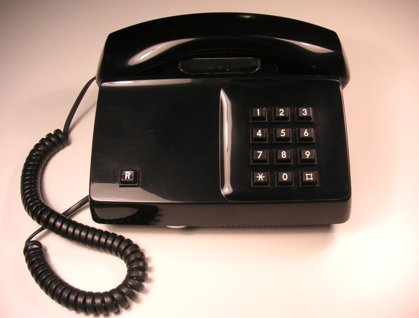 Carl-Arne Bregers DIAVOX-telefon från 1978